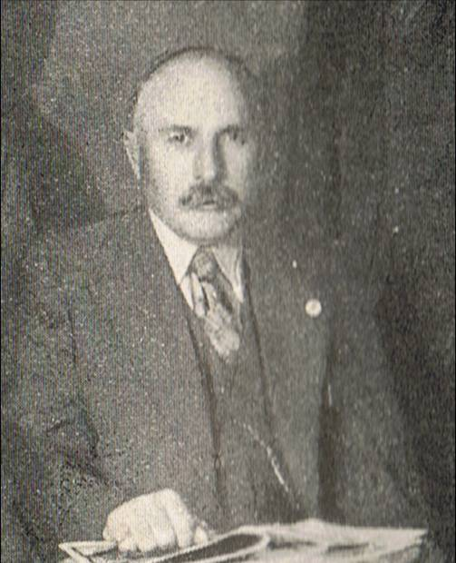 Kazimierz Pużak PPS